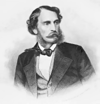 Franz von Dingelstedt (1818-1881)